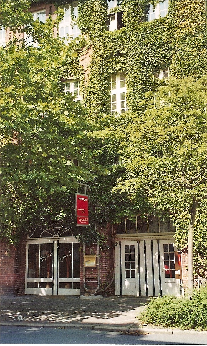 Junges Theater, Wilhelmshaven, Rheinstraße 91